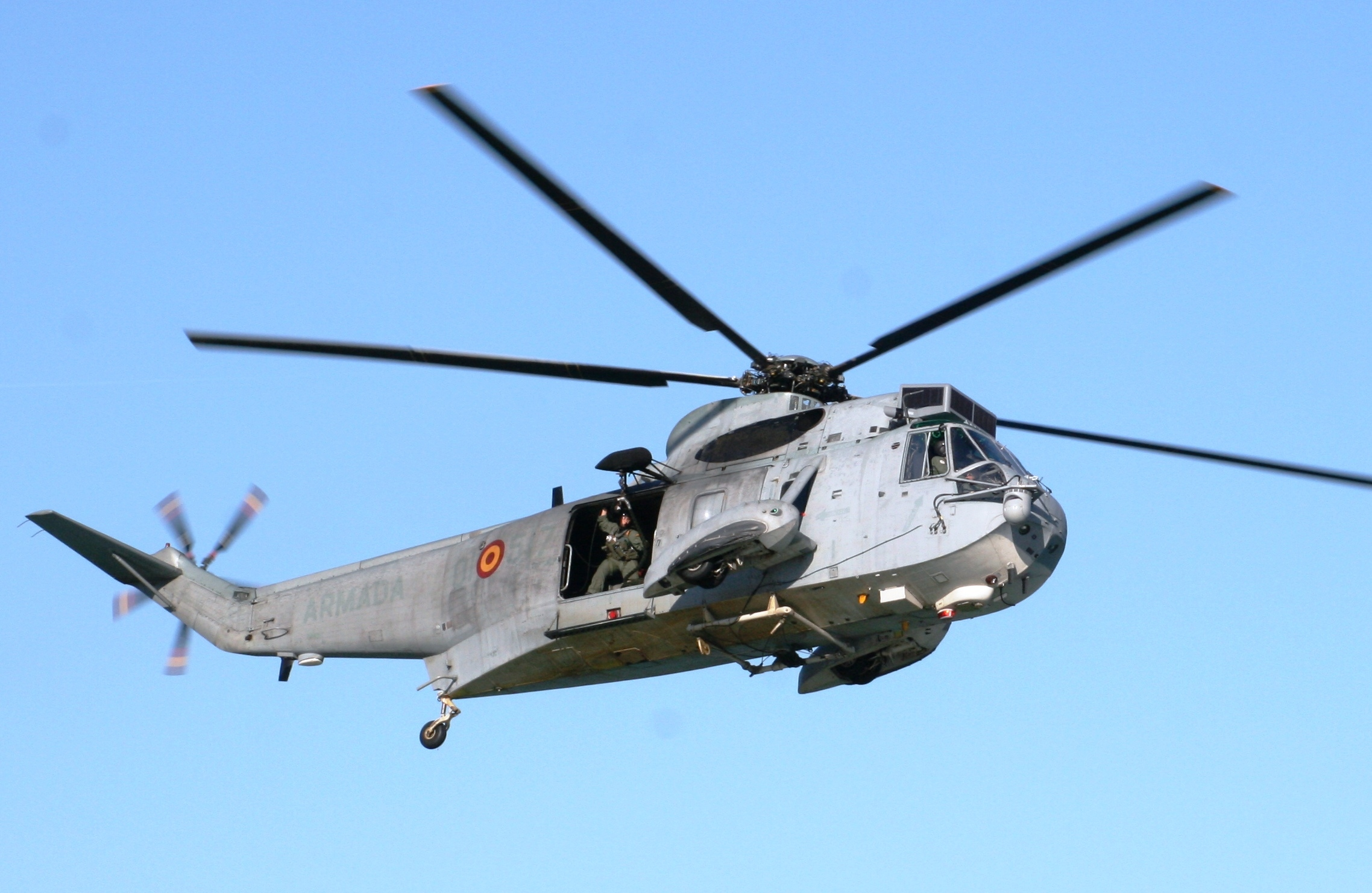 SH 3D en Santander.